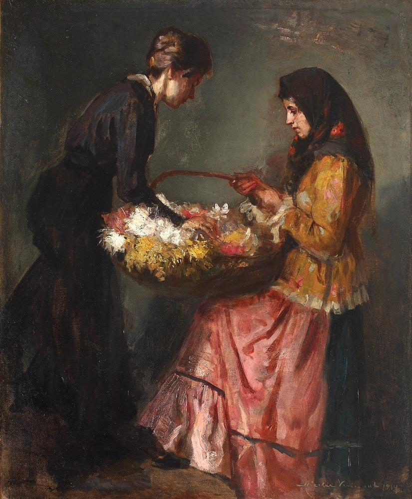 Nicolae Vermont - Florăreasa, ulei pe pânză, 60,5x50,5 cm, semnat şi datat dreapta jos, cu gri, Nicolae Vermont, 1914 .